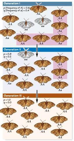 Fijación de alelos en la mariposa